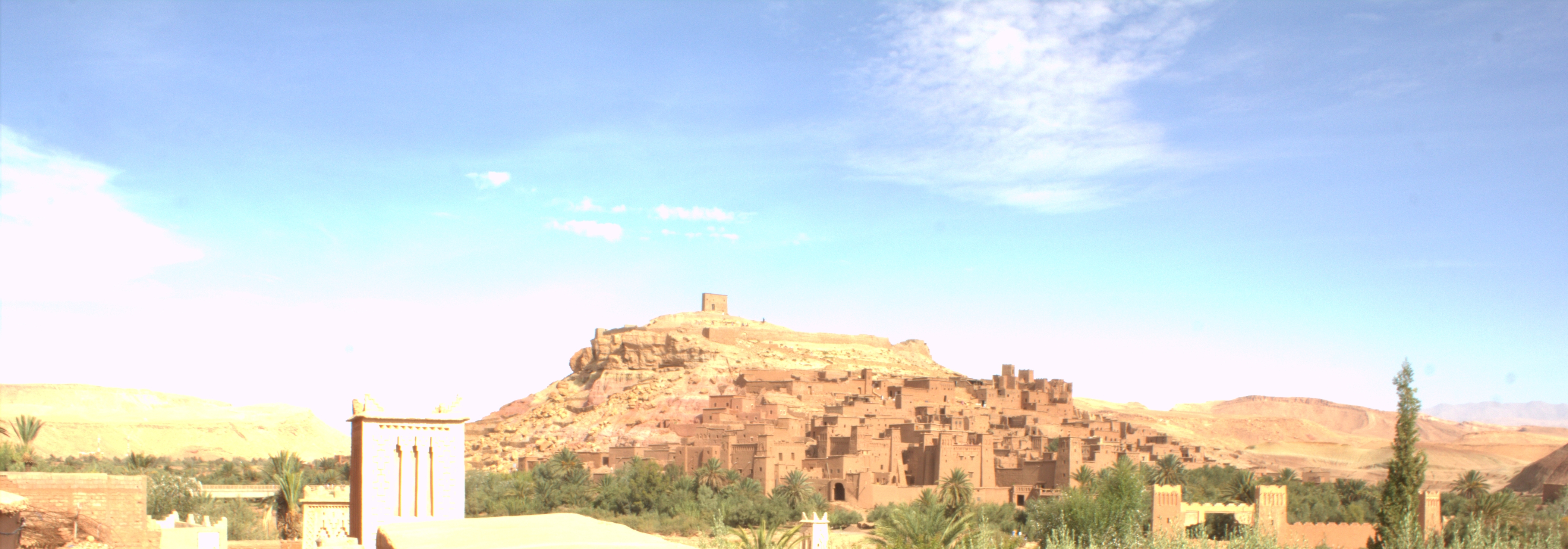 صورة لقصر آيت بن حدو ، من قرية آيت بن حدو المحاذية له